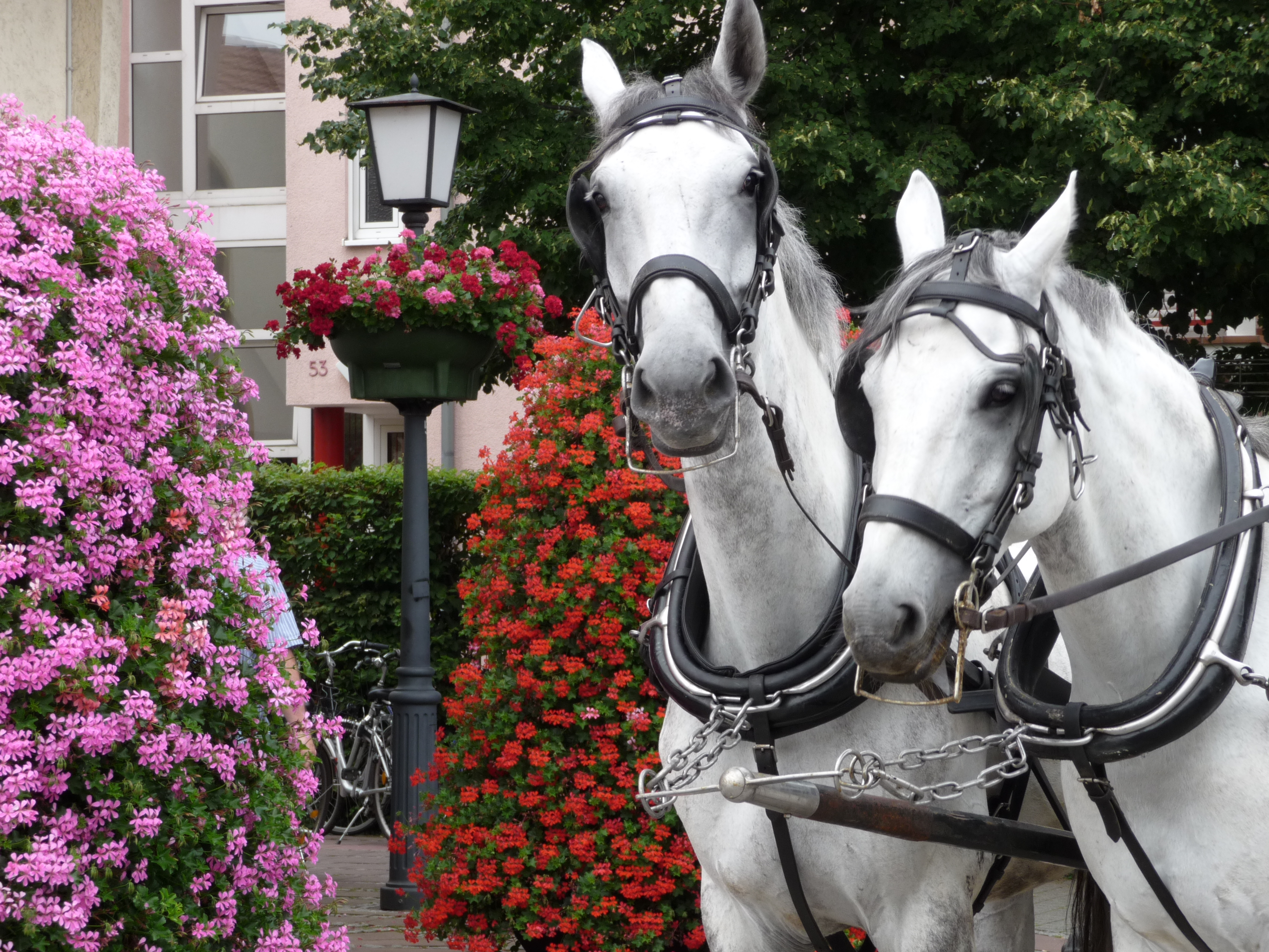 Pferdegespann vor einer Hochzeitskutsche